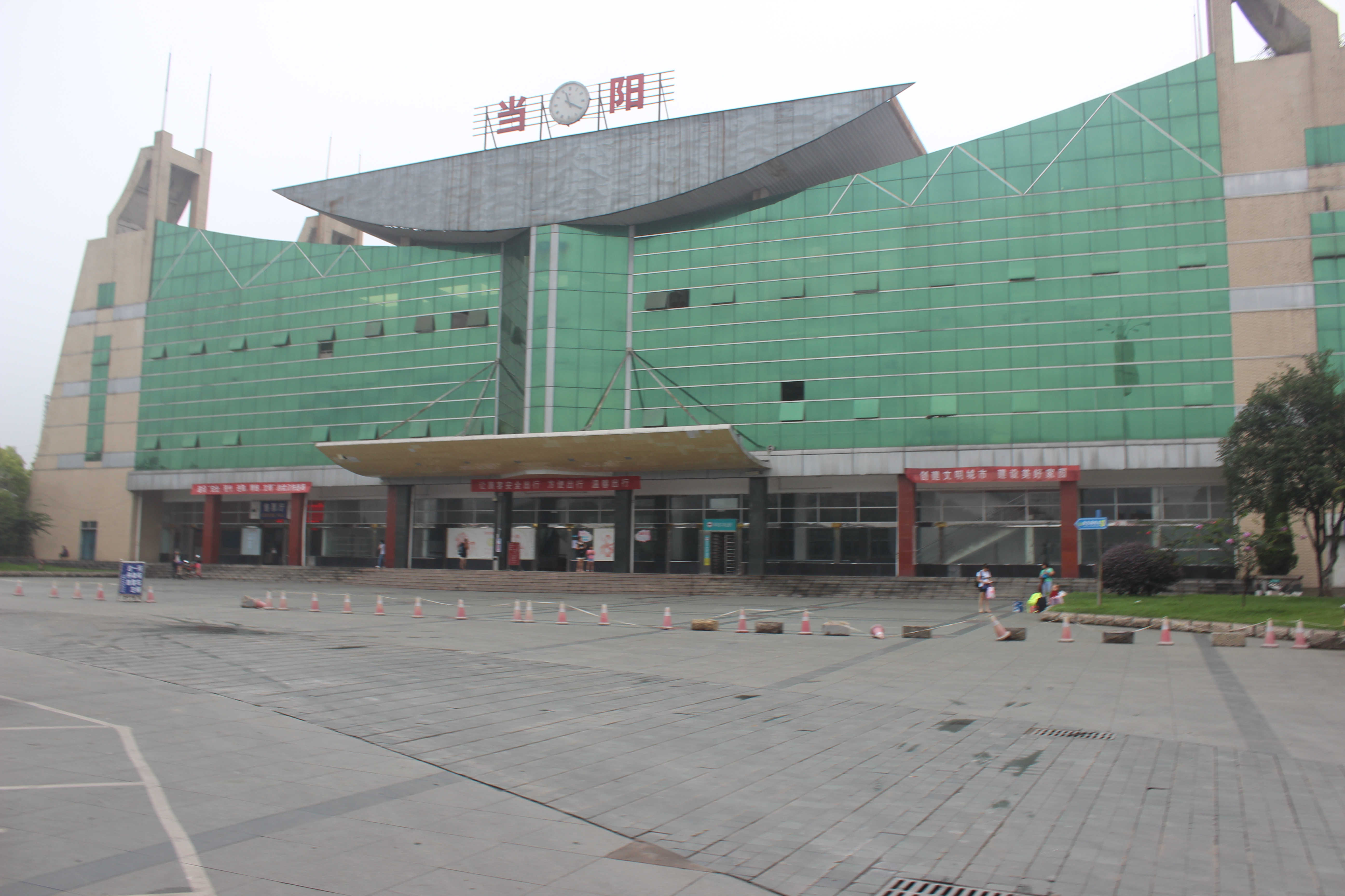 中文（中国大陆）: 当阳火车站 湖北省铁路系统 三等站